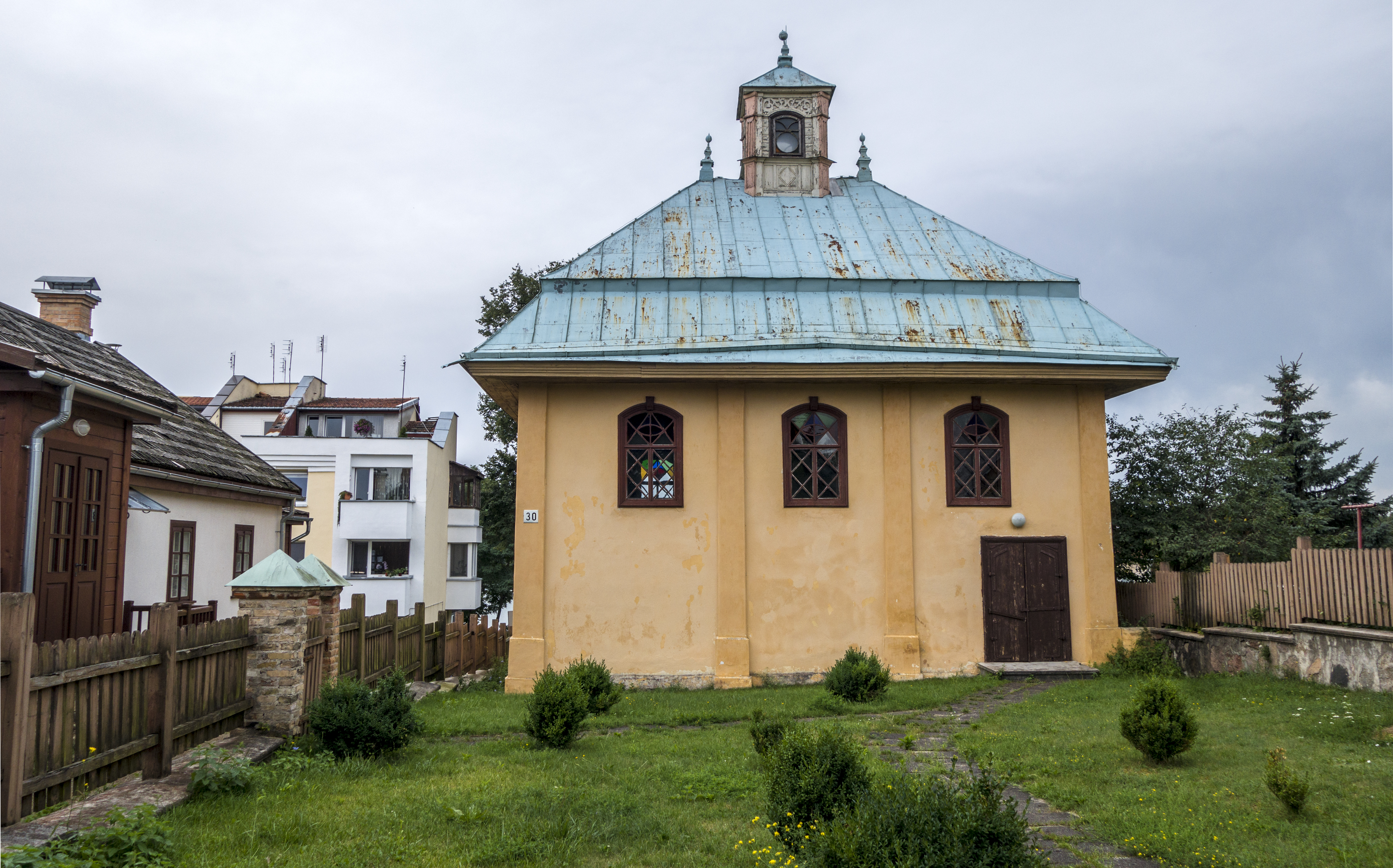 Karaimska kenesa w Trokach